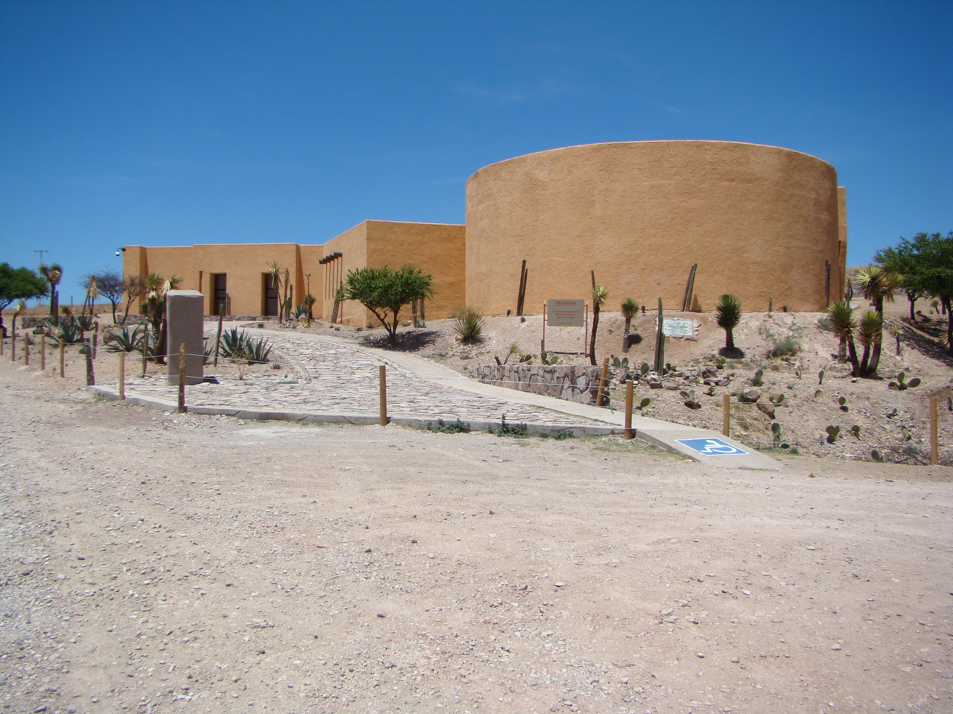 Museo de Altavista, Chalchihuites Zacatecas